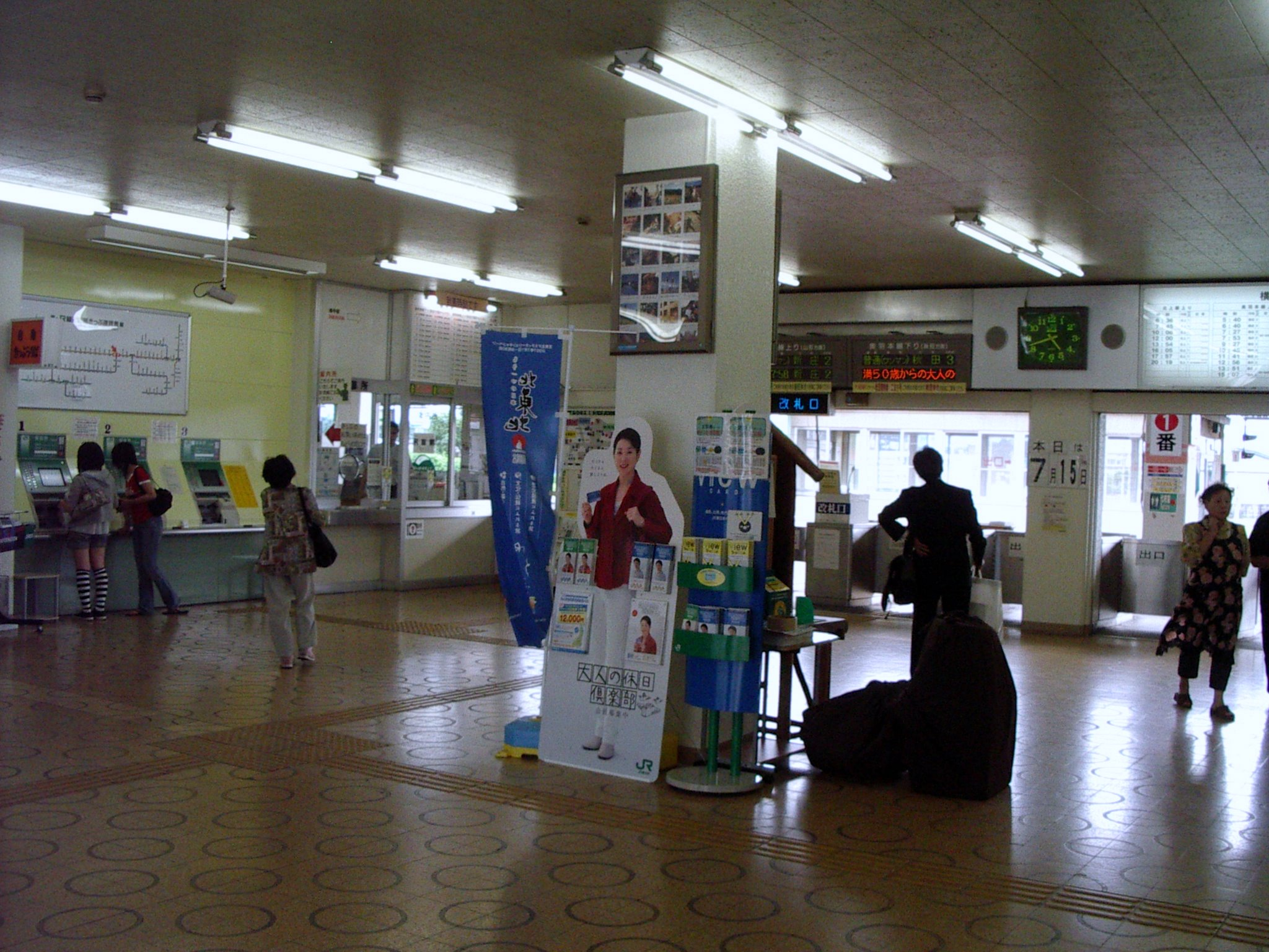 横手駅改札付近